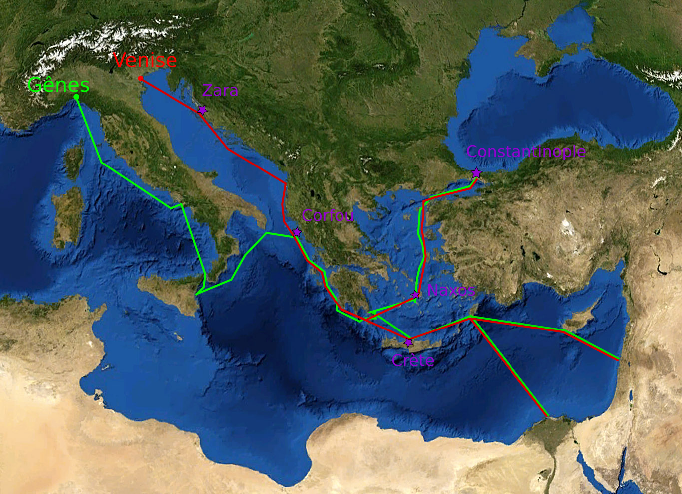 Carte simplifiée des routes commerciales génoises et vénitiennes en Méditerranée orientale et implication de Marco Sanudo / Simplified map of genovese and venitian trade roads in Eastern Mediterranean and Marco Sanudo implication